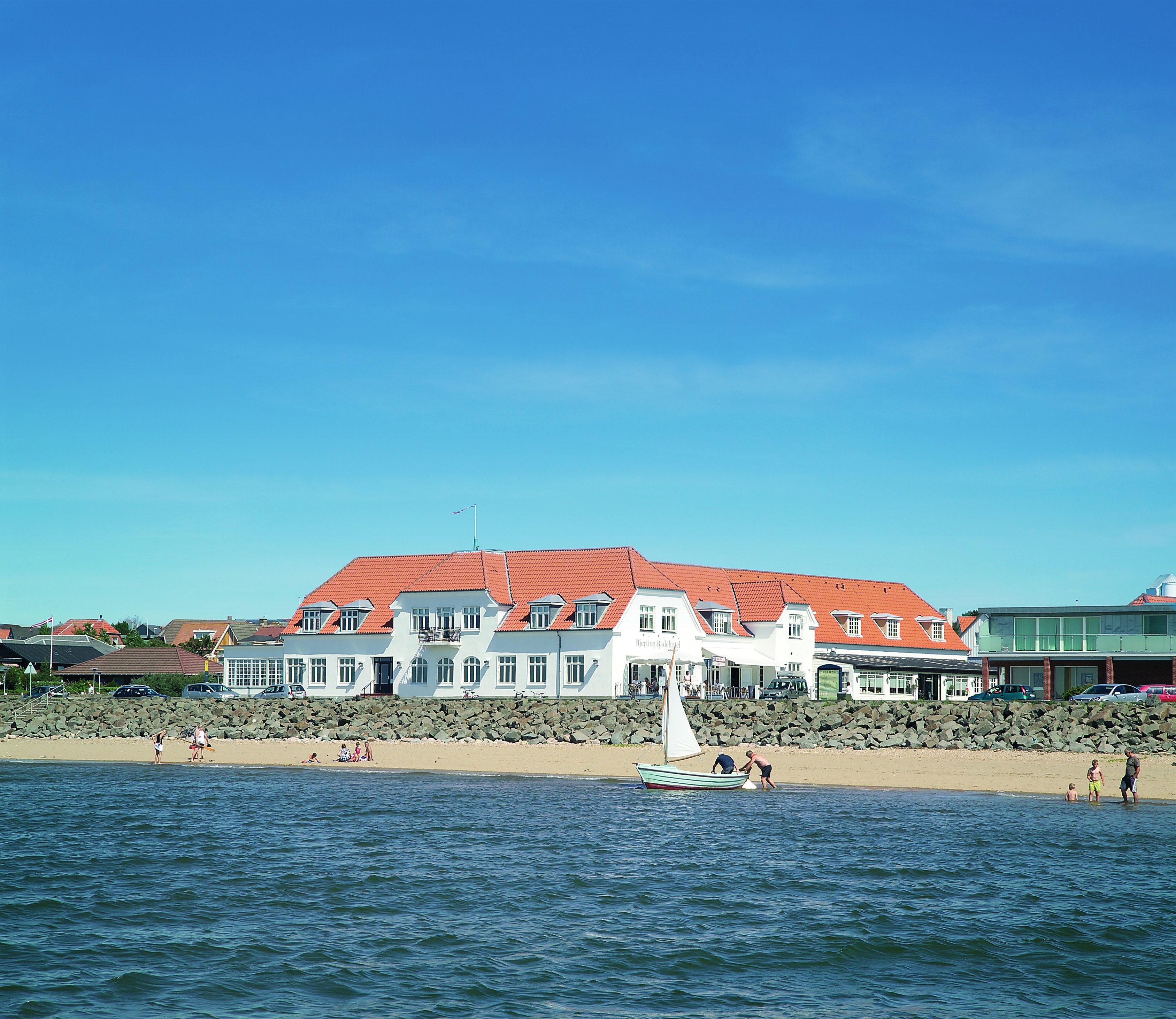 Hjerting seaside hotel